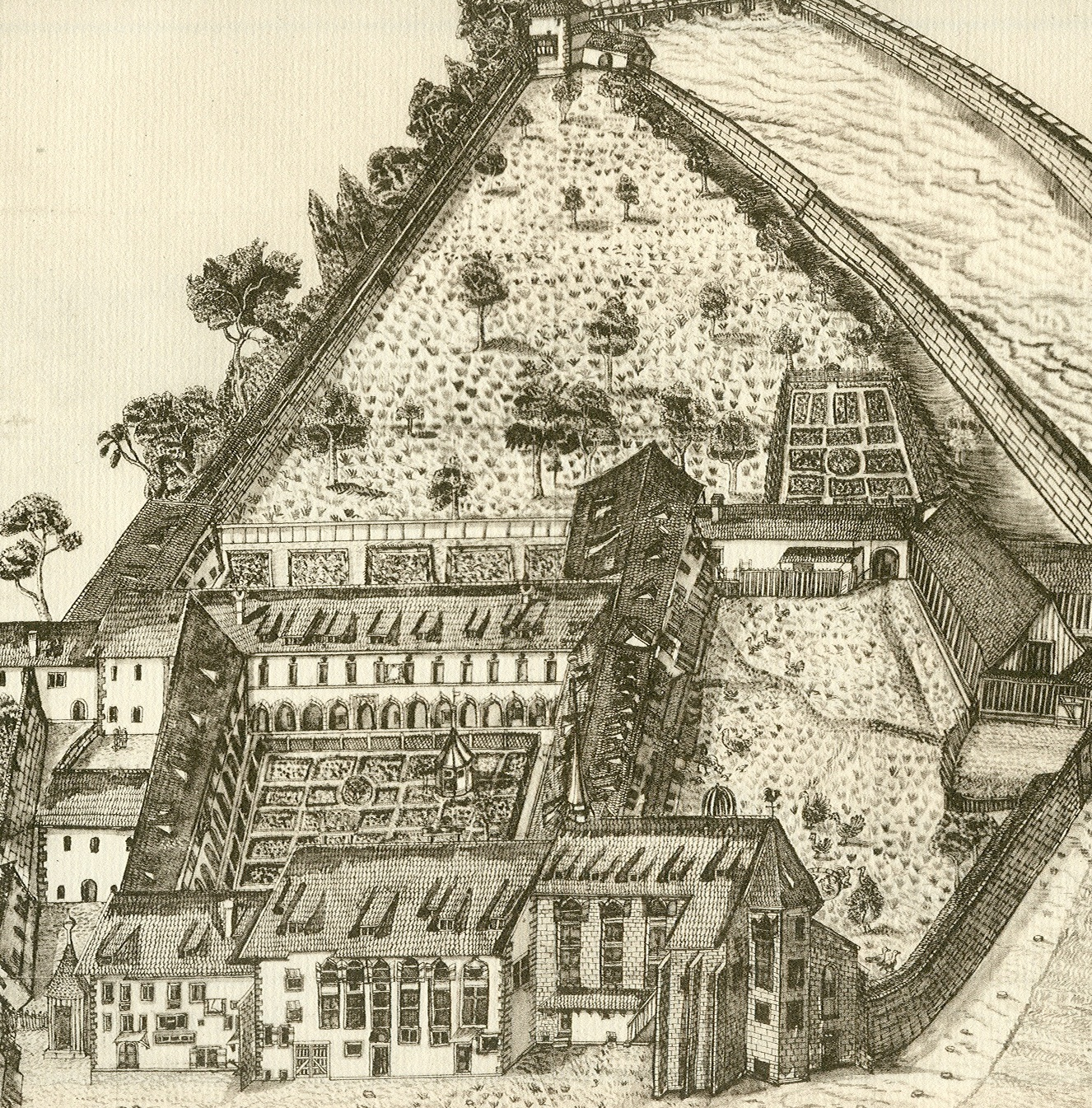 Das alte Kloster Oetenbach um 1700